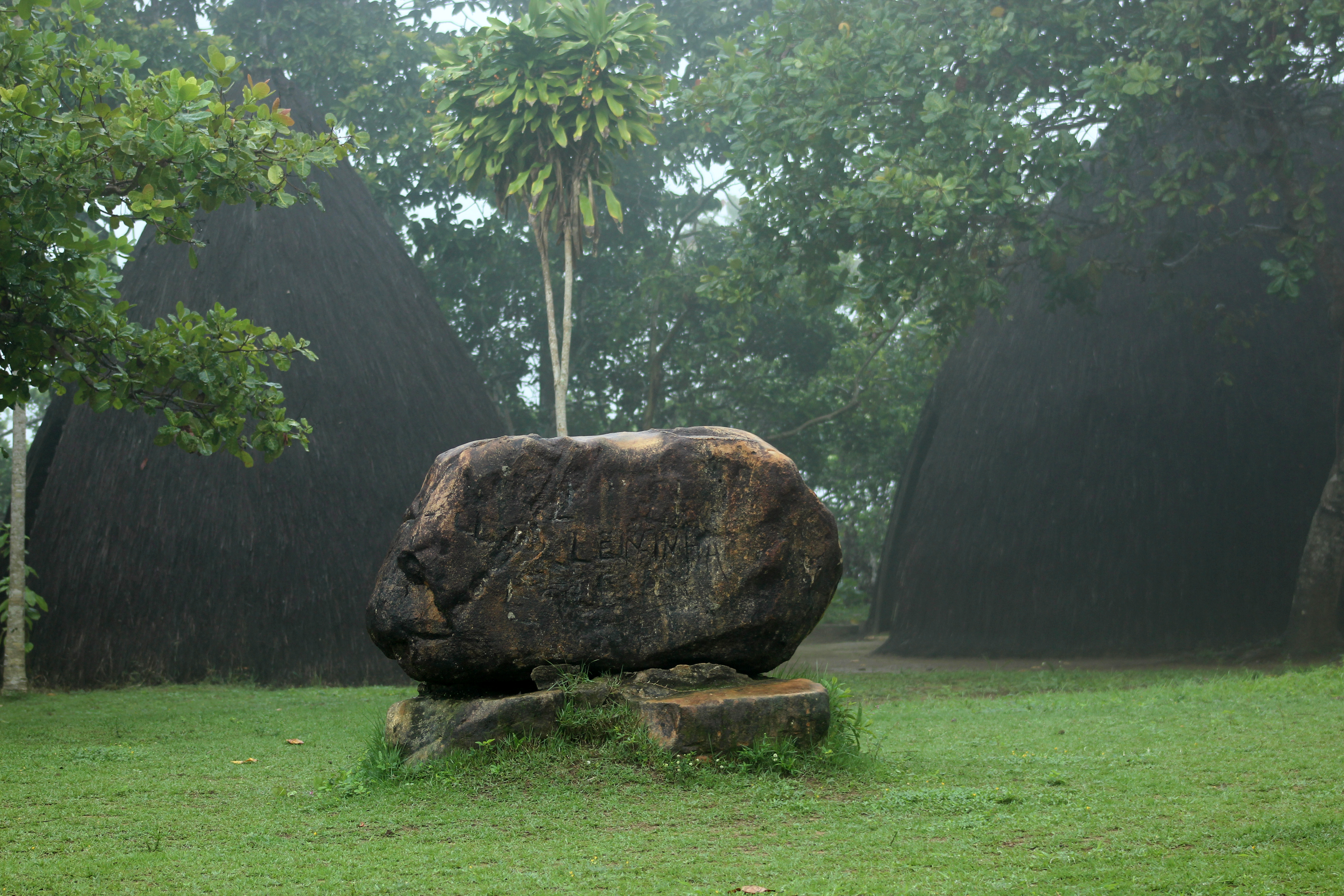 Pedra com escritas no memorial Quilombo dos Palmares